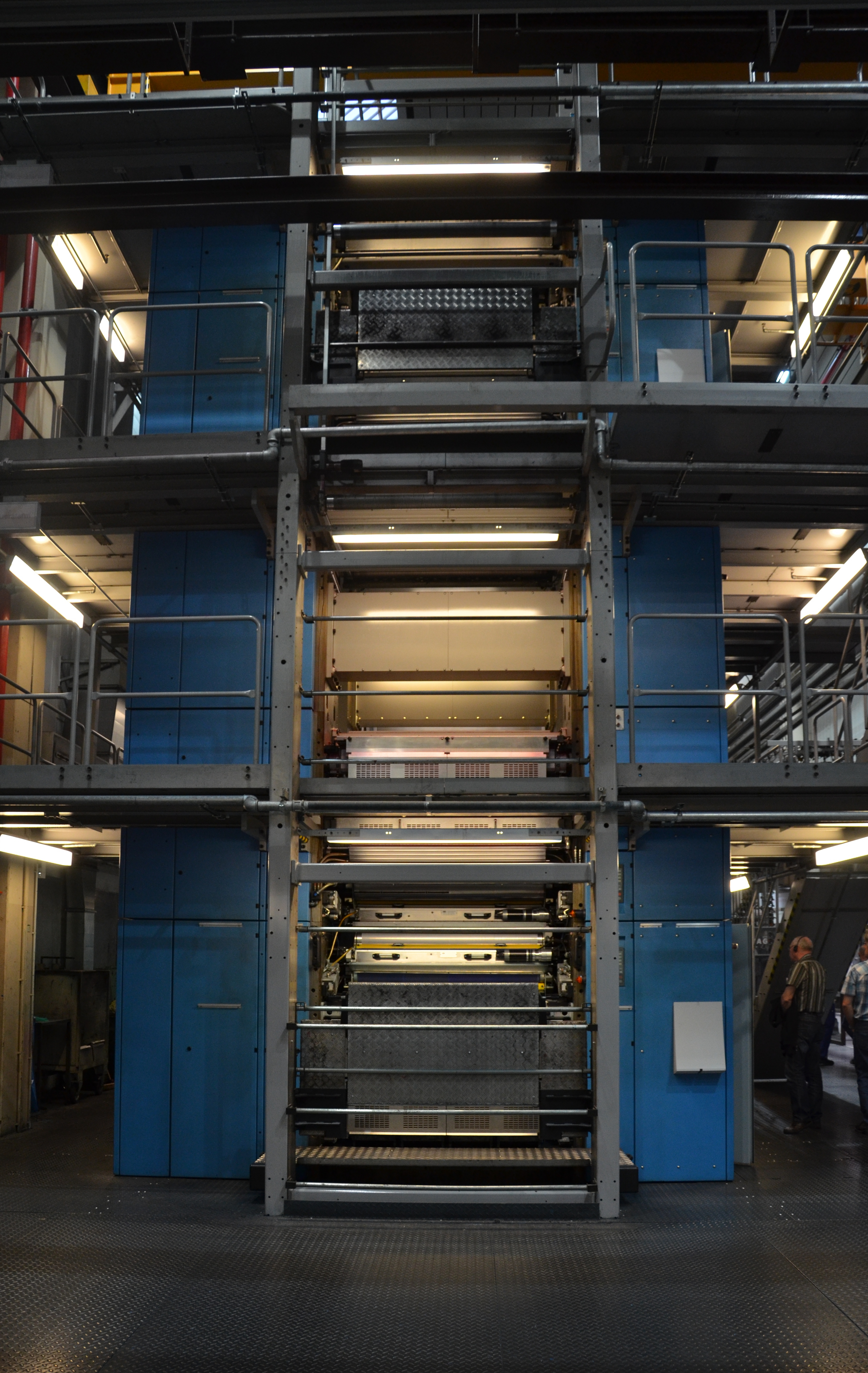 Druckhaus der WAZ Mediengruppe in Essen: Druckeinheit der WIFAG-Rotationsdruckmaschine.